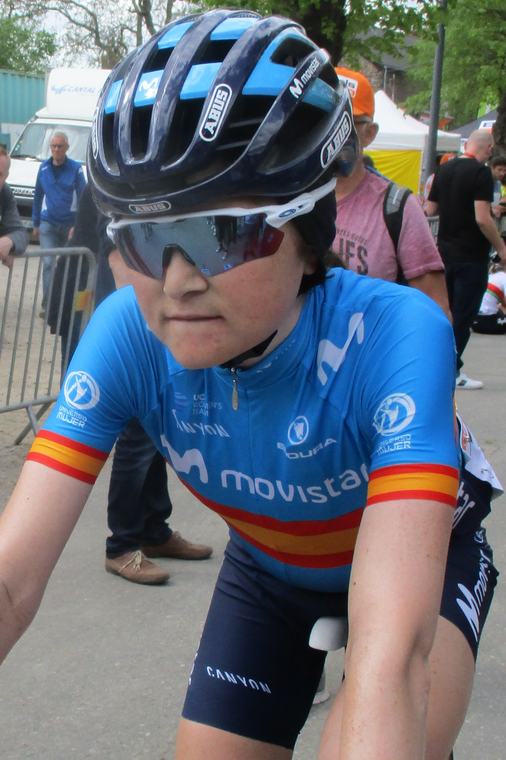 Finish van de Waalse Pijl 2019 voor vrouwen op de Mur de Huy